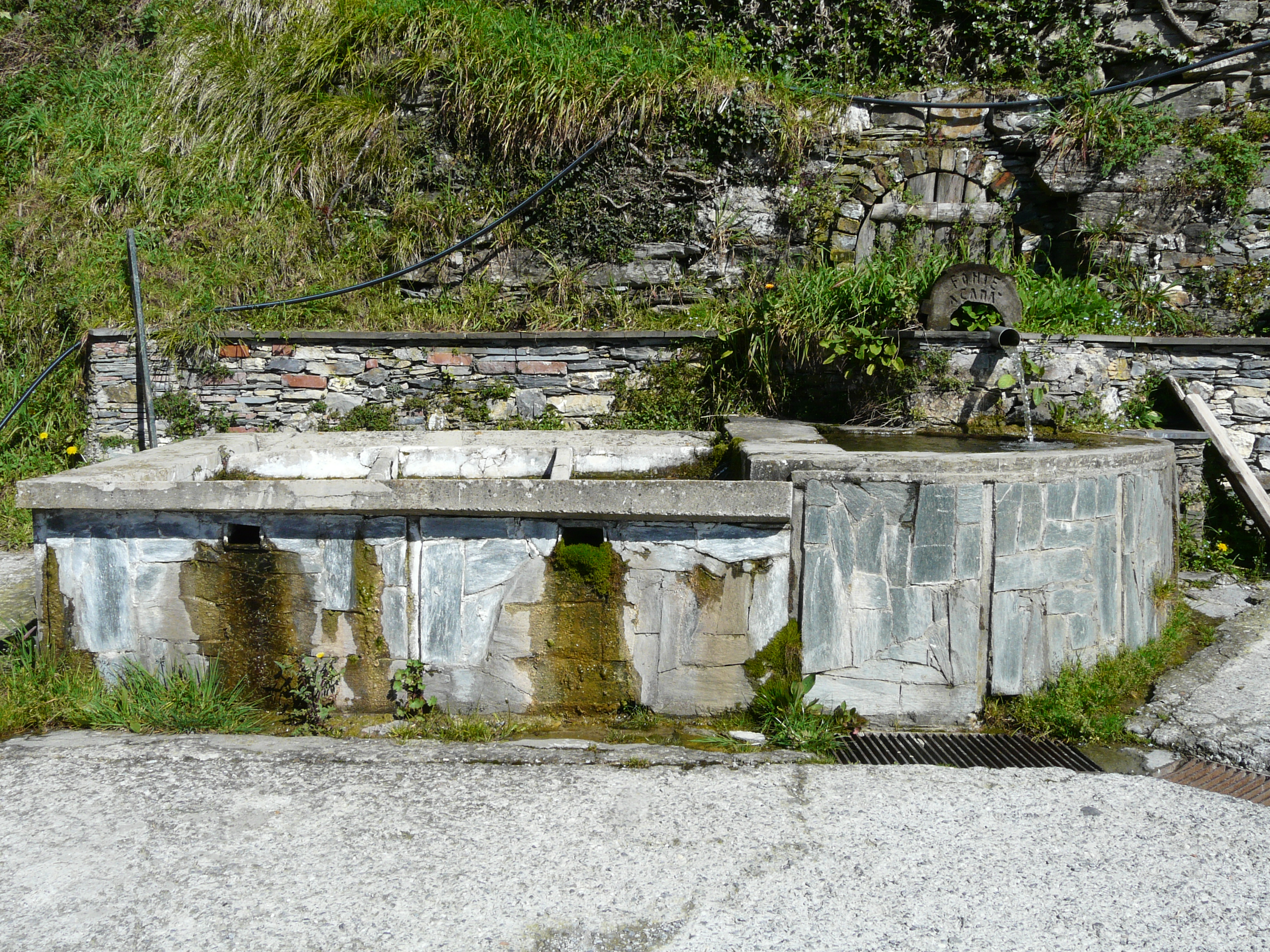 Antica fontana e lavatoio, Terrusso, Bargagli, Liguria, Italia